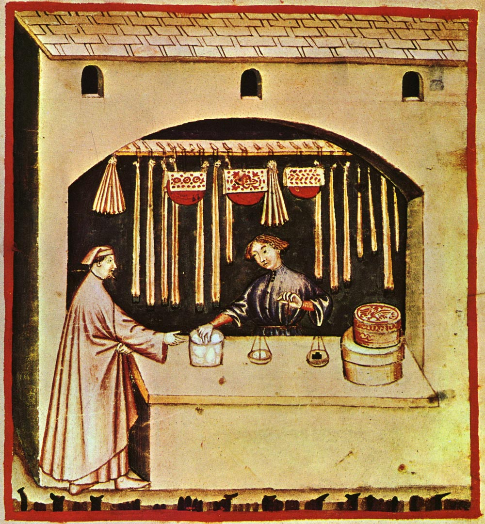 Tacuina sanitatis (XIV century) 6-alimenti, zucchero,Taccuino Sanitatis, Casanatense 4182.